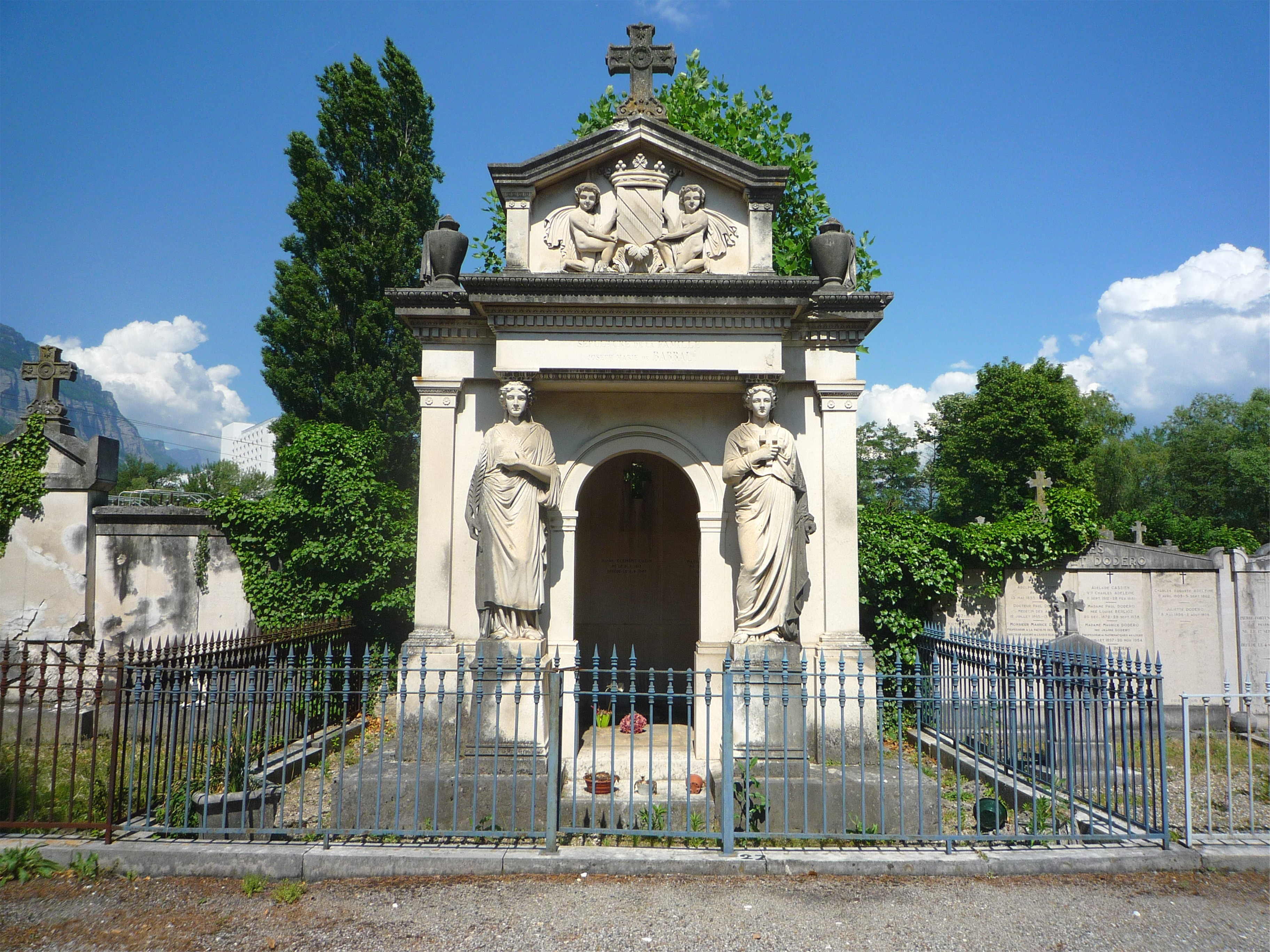 Joseph-Marie de Barral de Montferrat, maire de Grenoble en 1790, 1792 et 1800. Cimetière Saint Roch - Grenoble. Les cariatides sont l’œuvre de Aimé-Charles Irvoy